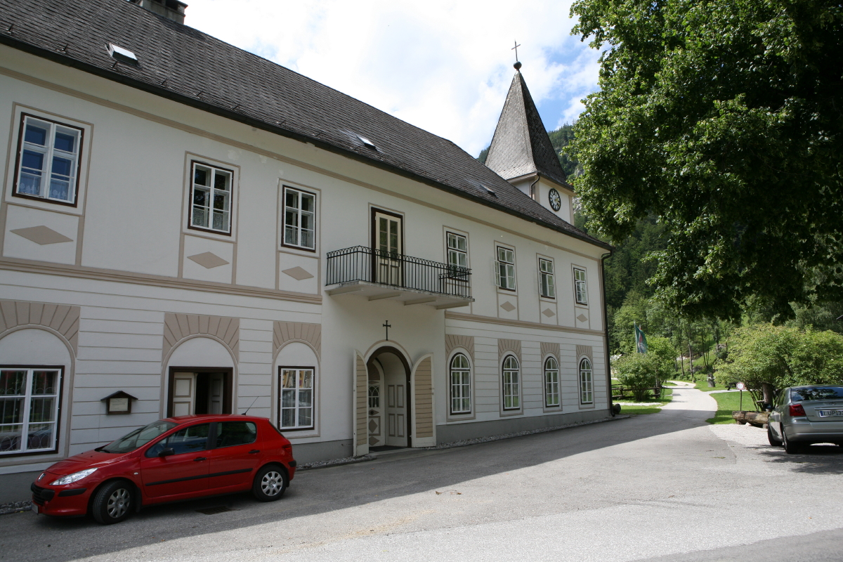 Evangelische Pfarrkirche Naßwald (Gemeinde Schwarzau im Gebirge), gegründet 1826 von Georg Hubmer, genannt Raxkönig